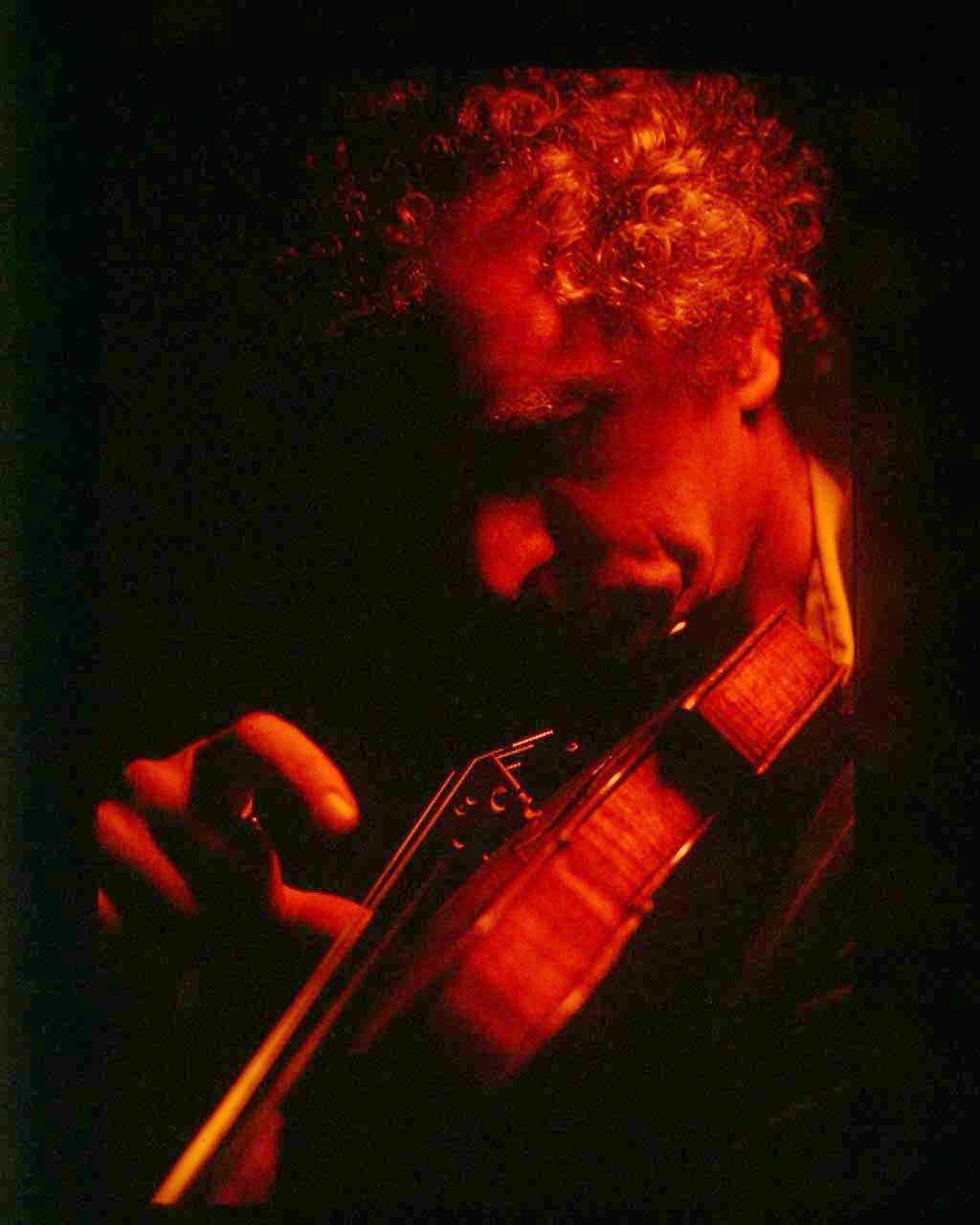 Jan Hulst plays the violin